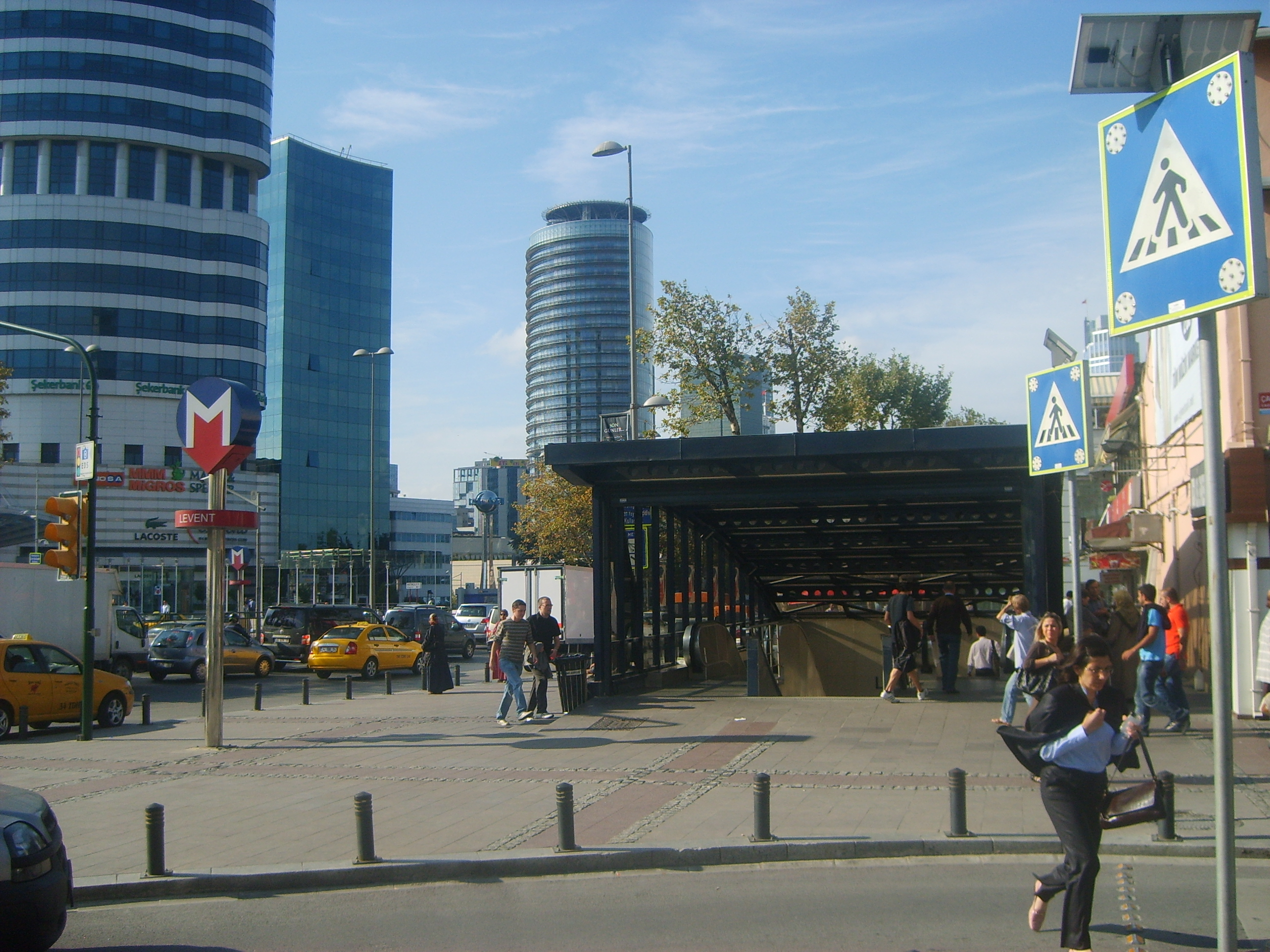 İstanbul, raylı sistemler istanbul metrosu